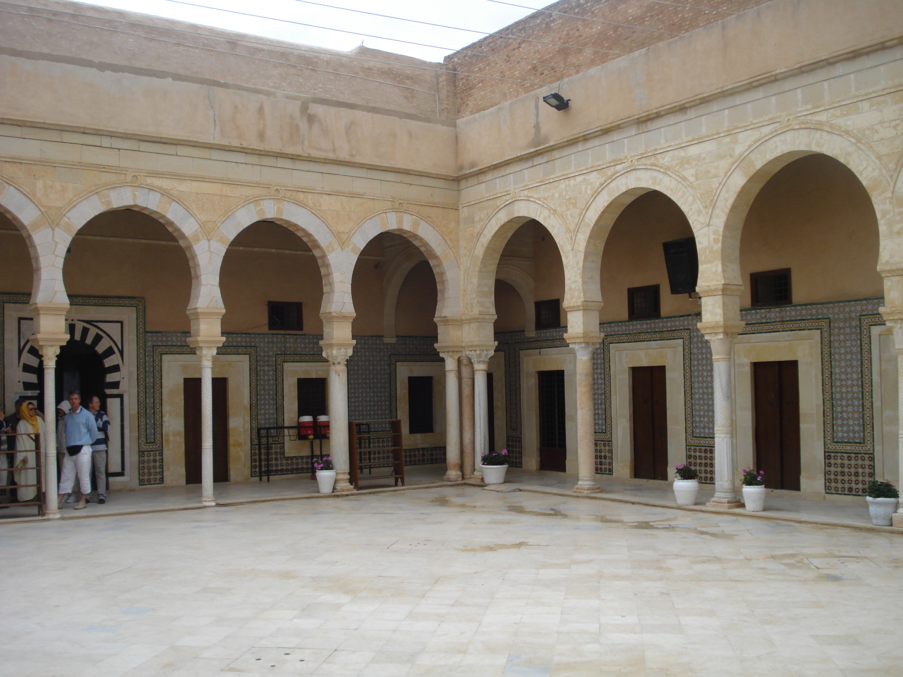 Cour du sanctuaire de la mosquée du Barbier à Kairouan (Tunisie)